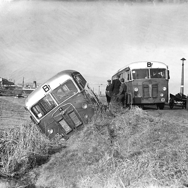 Autobus bijna in het water van het Zijkanaal I, Cornelis Douwesweg, 6 november 1946 Foto Ben van Meerendonk / AHF, collectie IISG, Amsterdam